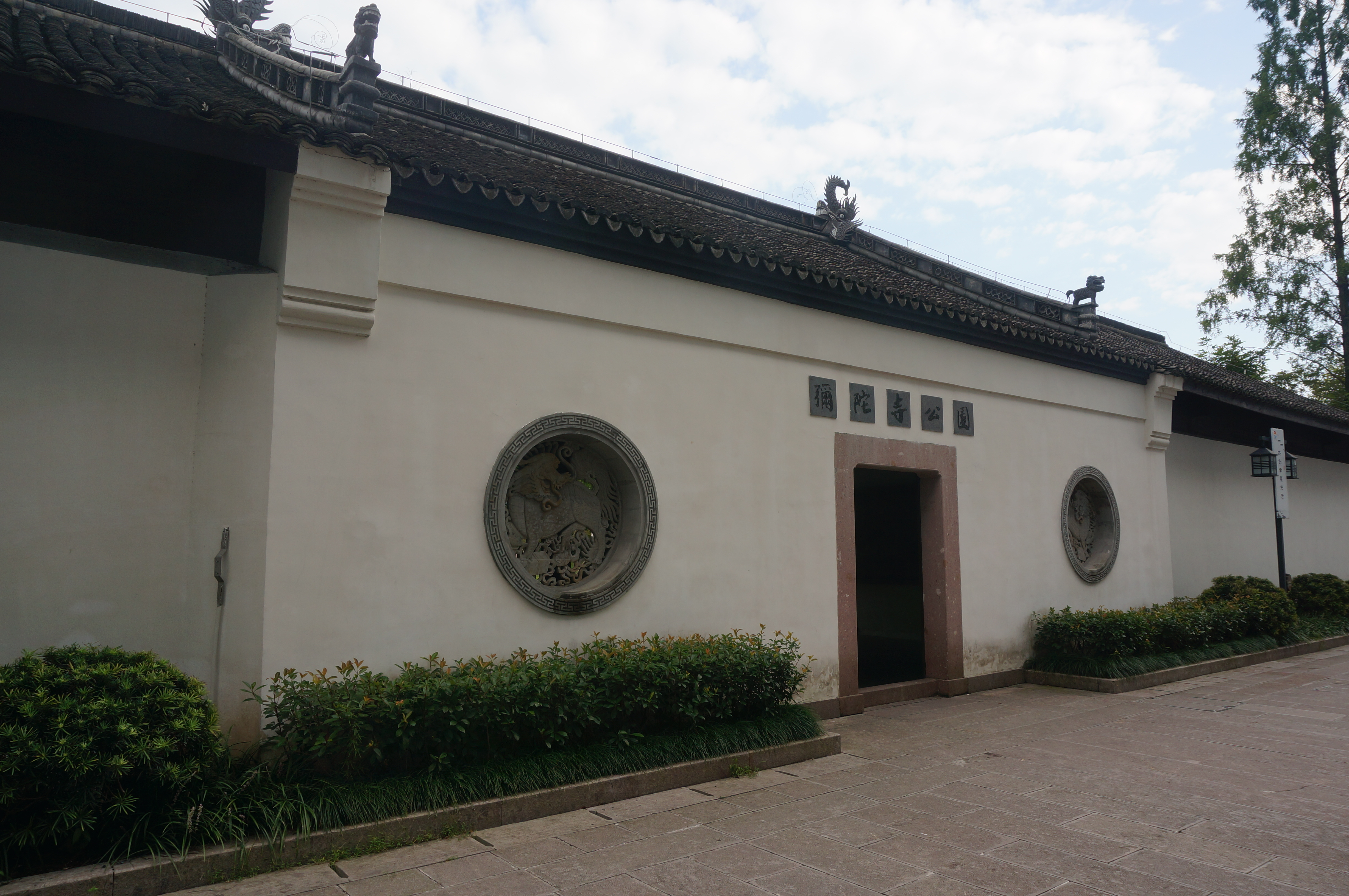 杭州弥陀寺，山门（韦陀殿）北侧（外侧）。